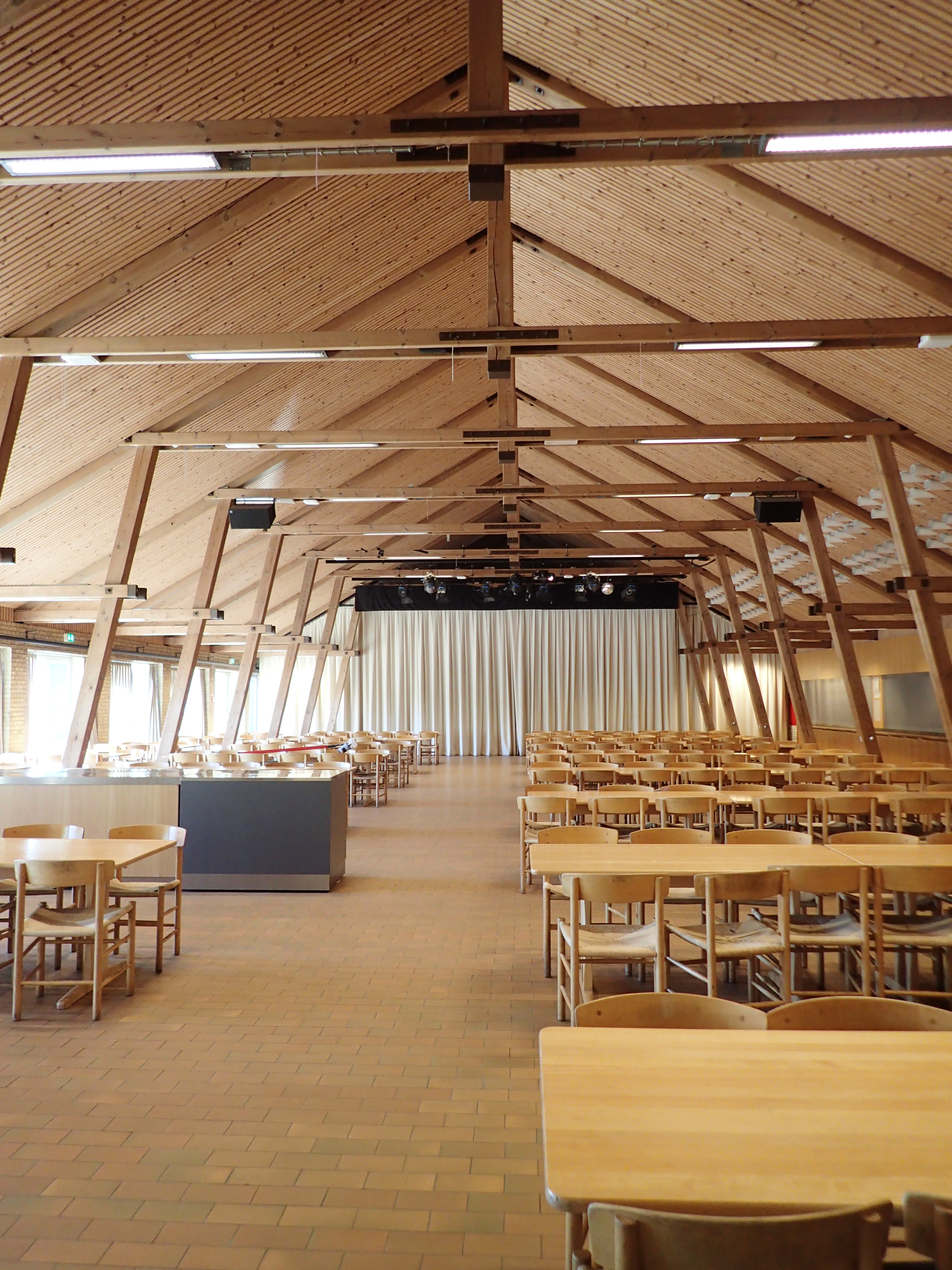 Stakladen